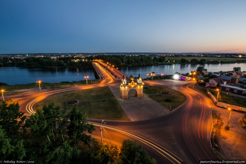 Триумфальная Арка в г. Канске